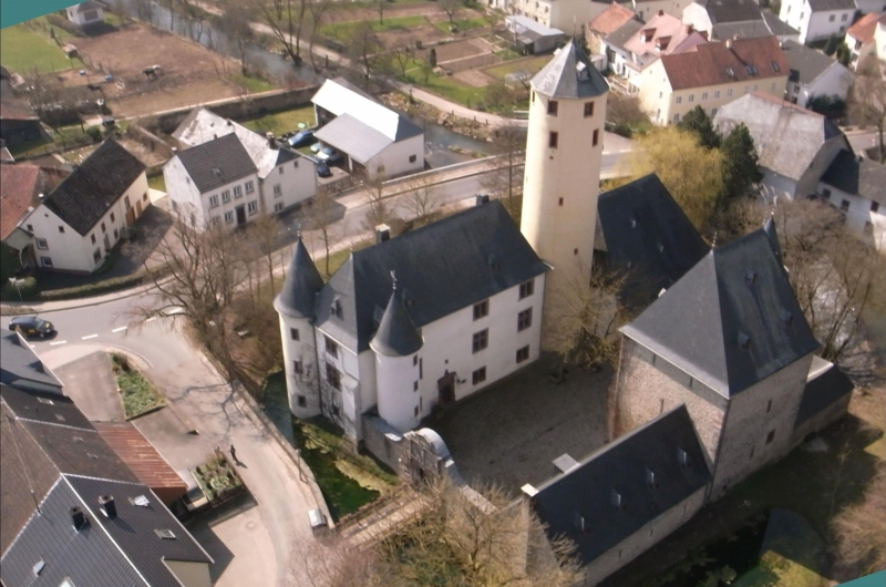 Luftbild mit einem Fesseldrachen zur Dokumentation. Die Wasserburg steht in der Eifel im Ort Rittersdorf an der Nims. Im 13. Jh. erteilte Rudolf von Habsburg dem Luxemburger Grafen Heinrich IV. die Genehmigung zum Bau dieser Burg. Der runde Bergfried wurde erst später zum Ende des 13. Jh.angebaut. Der quadratische Wohnturm entstand erst nach 1529 in hochgotischer Zeit durch die Herren von Enscheringen. Weitgehende Zerstörungen erfolgten im 30jährigen Krieg und im pfälzischen Erbfolgekrieg 1685 - 1697. Zu Beginn des 20. Jh. sprach man wegen des sehr schlechten Zustandes von der "ehemaligen Burg Rittersdorf". Zu weitere Schäden kam es im Zweiten Weltkrieg. Danach gelangte die Anlage in öffentlichen Besitz. 1978 wurde mit hohem Aufwand und Einsatz die Restaurierung begonnen, die 1987 mit der Einweihung abgeschlossen werden konnte.